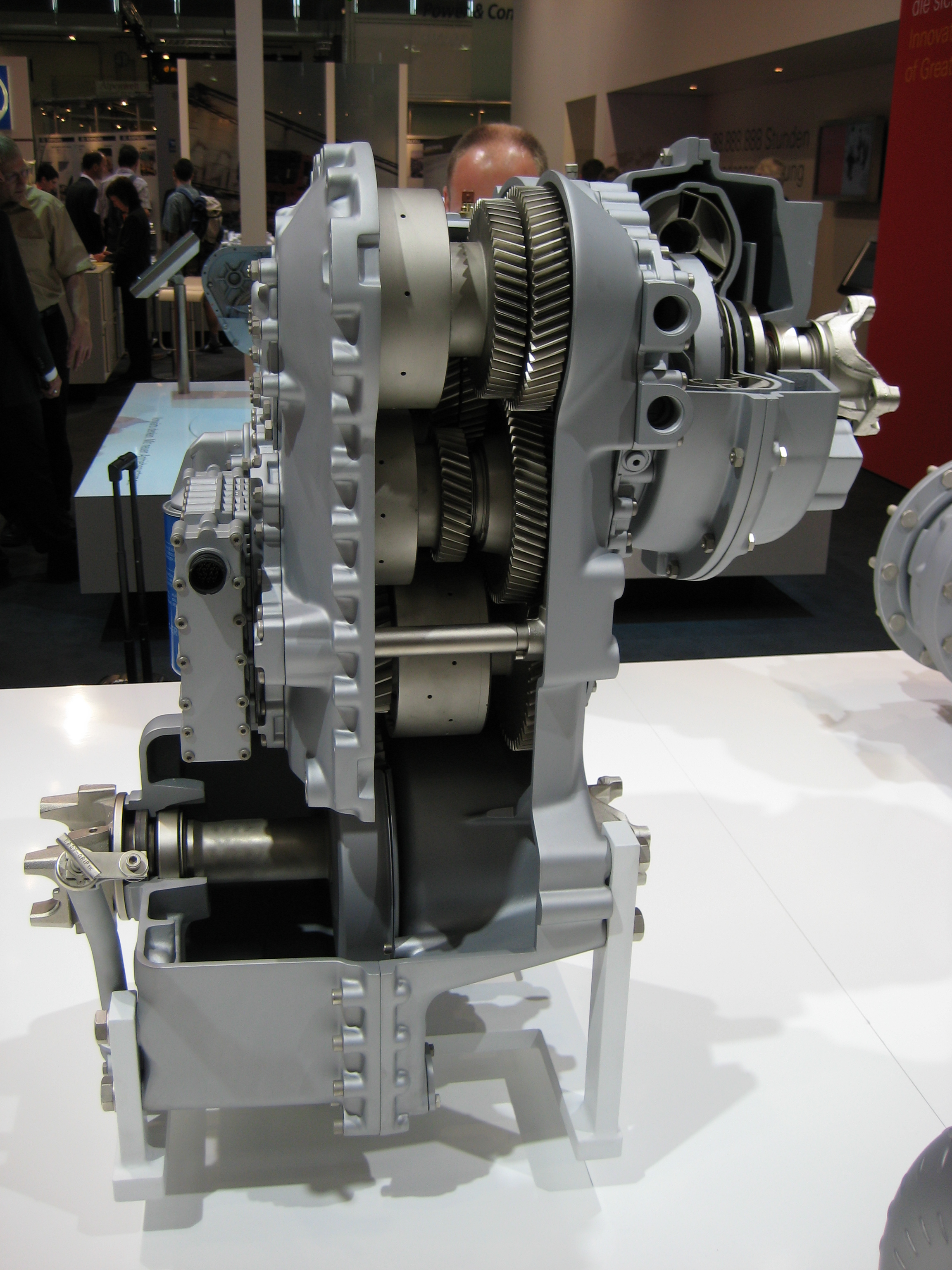 BAUMA 2007, ZF Baumaschinengetriebe